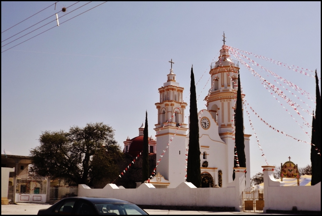 Templo Santa Maria Magdalena,La Magdalena Tlatlauitepec,Estado de Puebla,México